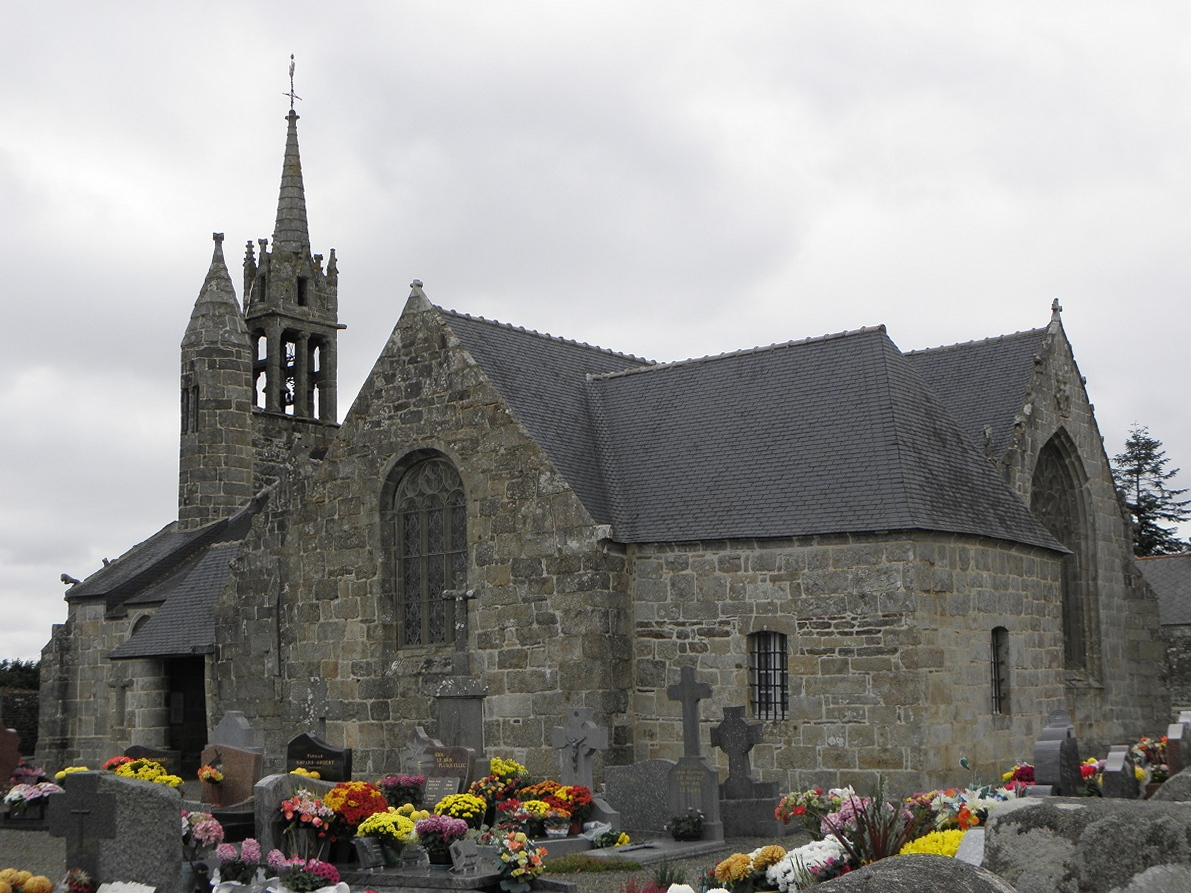 Église Notre-Dame de Gurunhuel (22). Chevet et flanc sud.